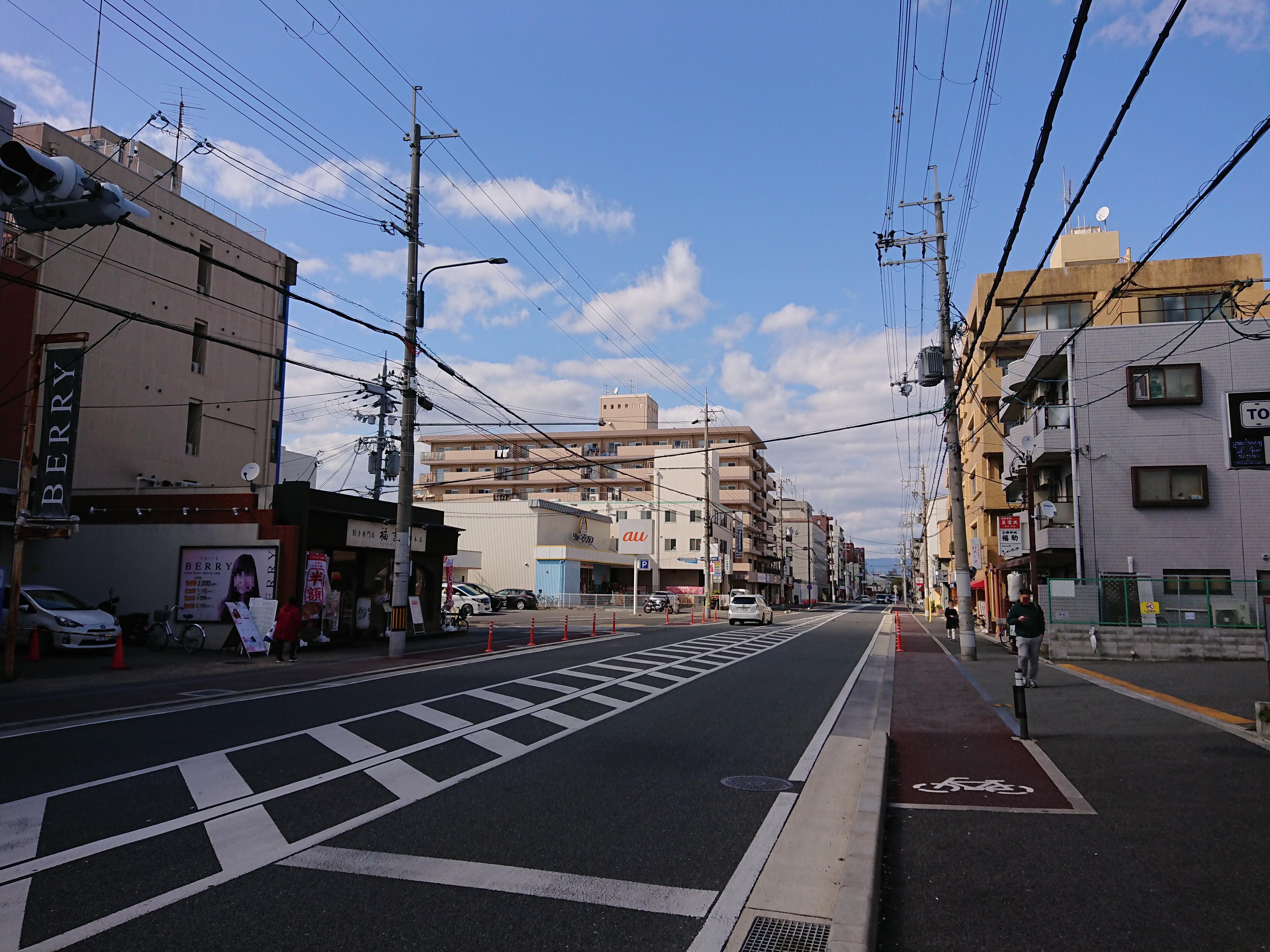 師団街道 第二軍道付近より北望（京都市伏見区）